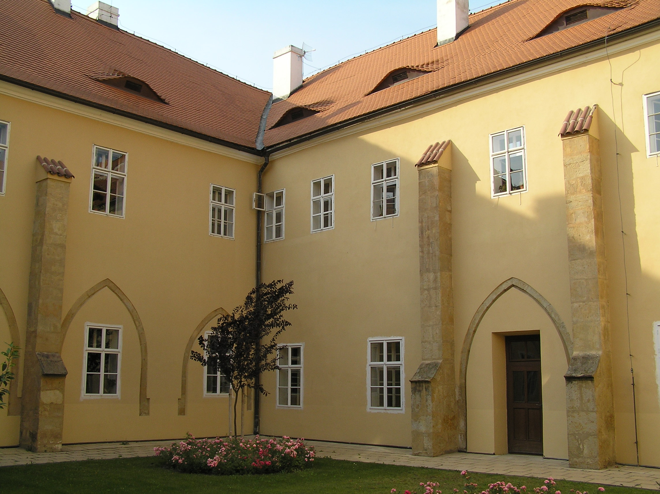 Klášter dominikánský (Litoměřice), Krajská 48, Litoměřice